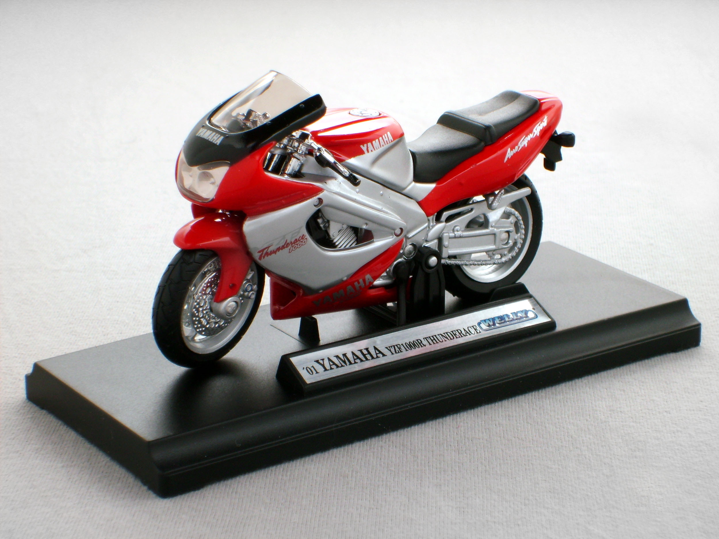 Motocicleta a escala, marca Welly, modelo 2001 Yamaha YZF1000R Thumderace, de la serie Motorcycle Series.